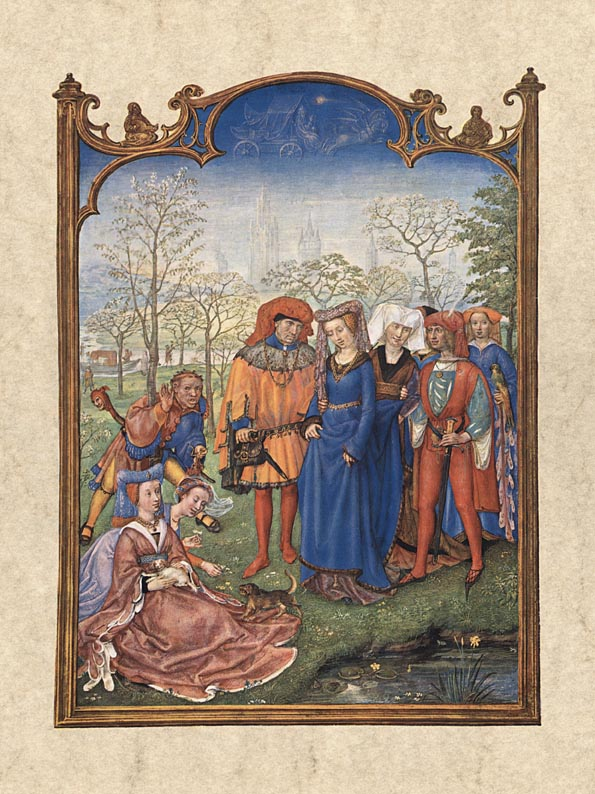 April, Brevarium Grimani, fol. 5v (Flemish)